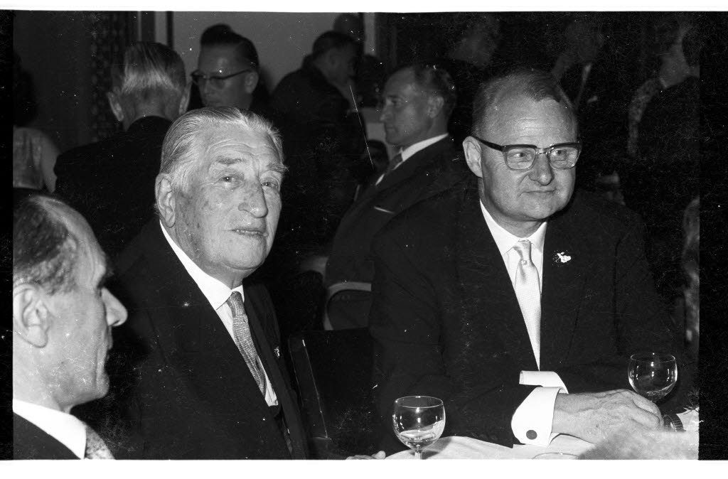 im Rathaus. Gäste im Ratssaal. Im Bild Felix Graf von Luckner (links) und Stadtrat Heinz Kiekebusch (rechts).